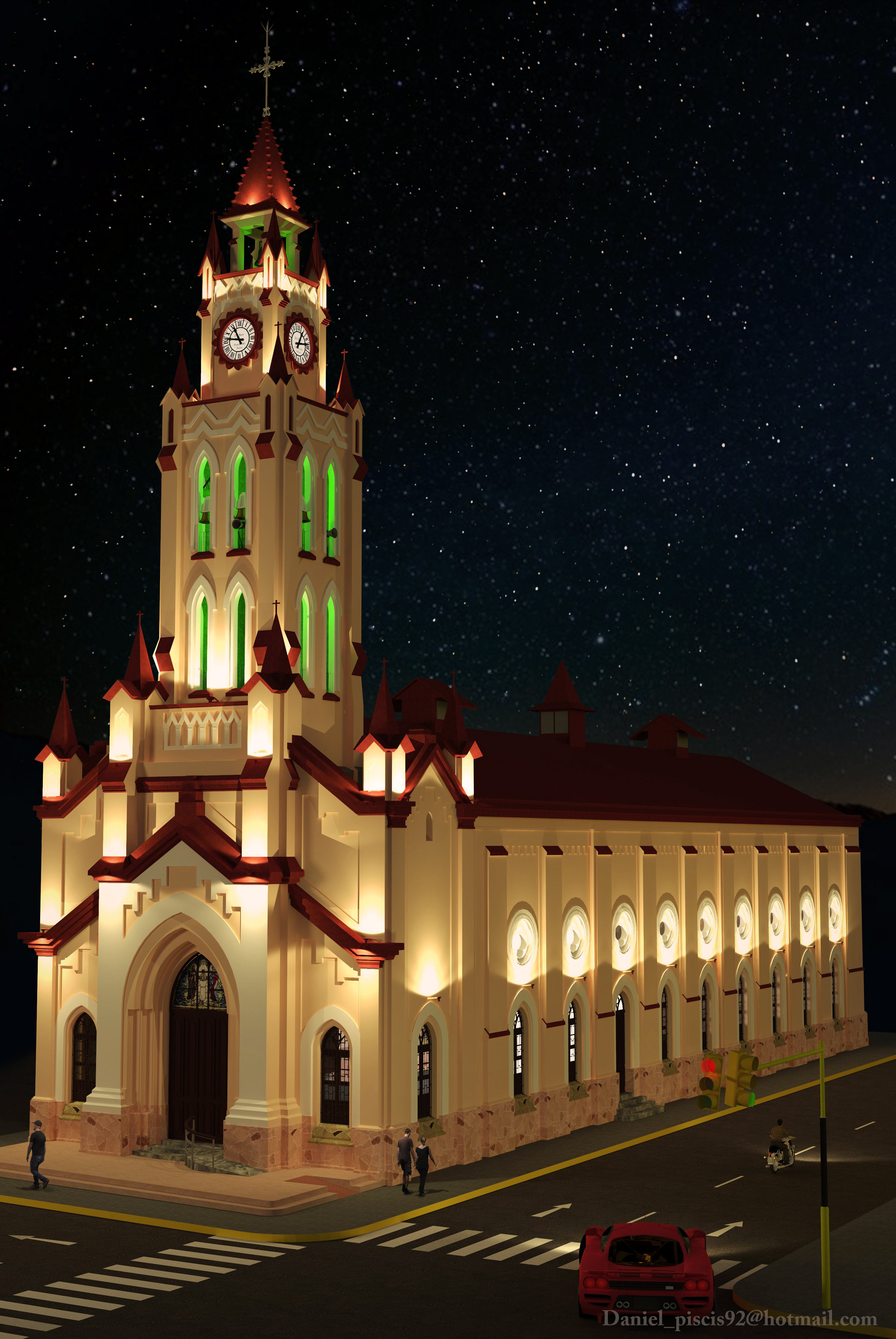 Les comparto este render 3D de la Iglesia Matriz de la hermosa ciudad de Iquitos. Una vista nocturna...